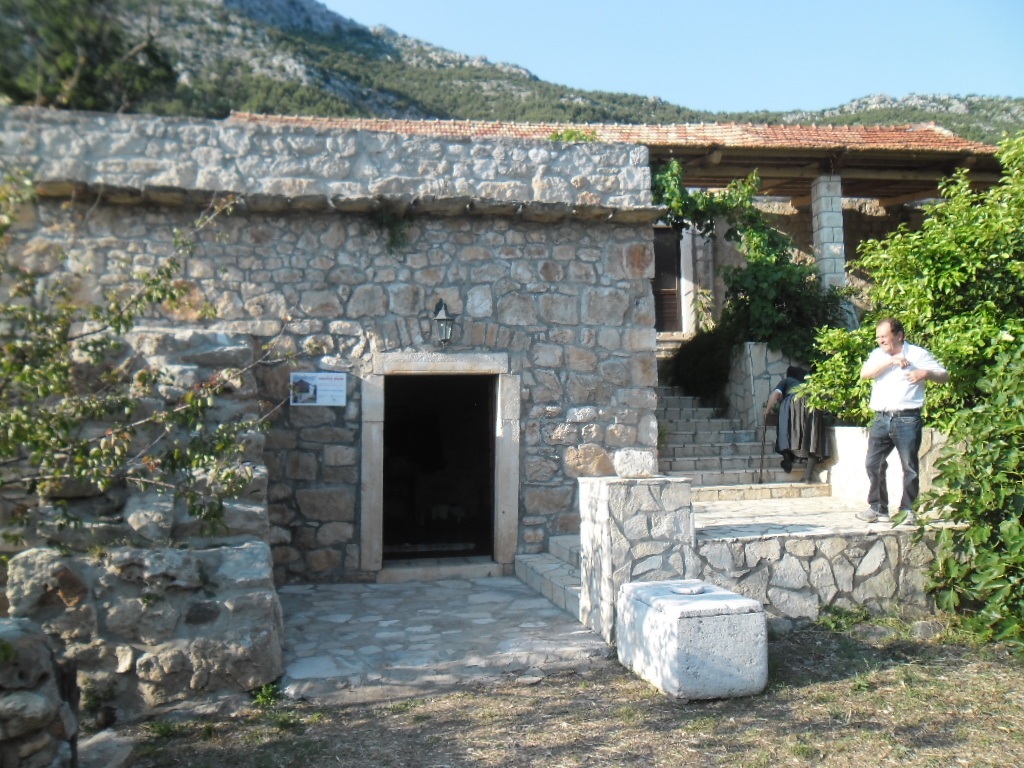 Knežev dvor u Babinom polju, Mljet